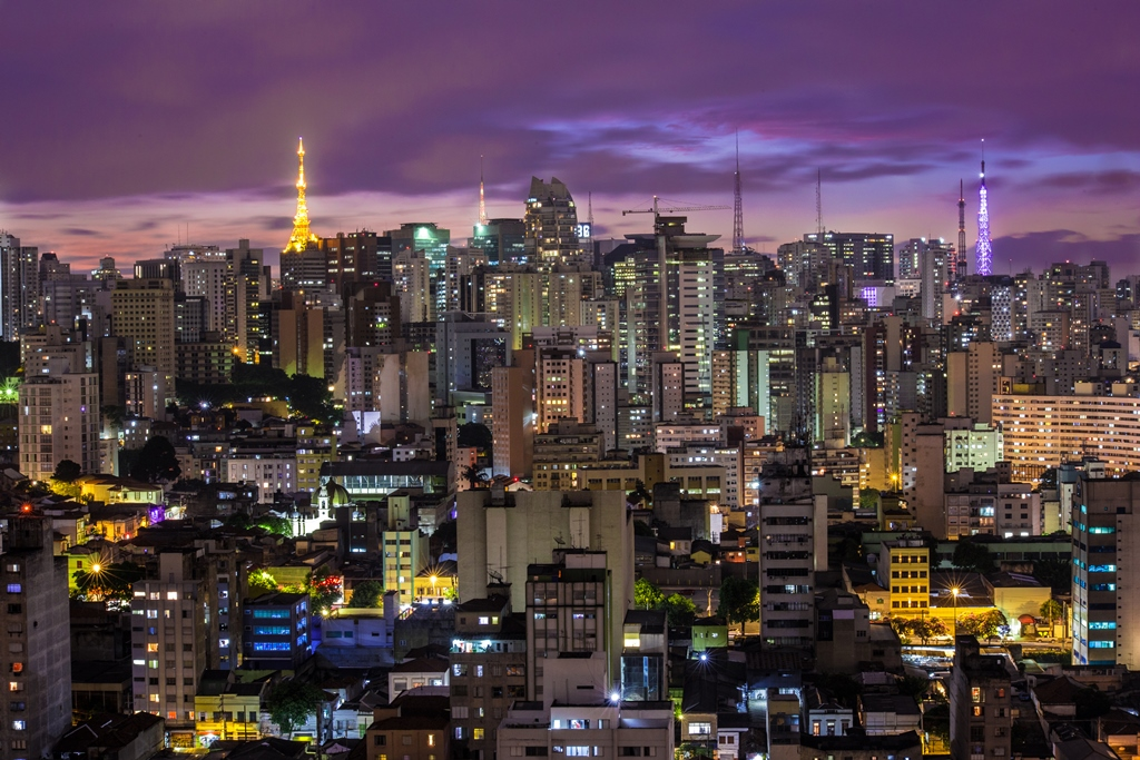 Panorama da cidade de São Paulo à noite.